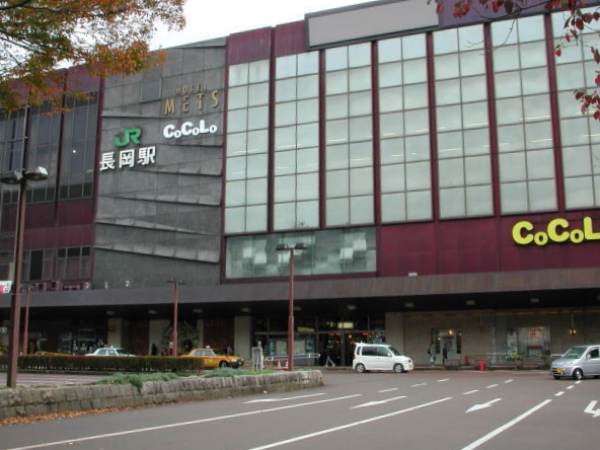 JR長岡駅大手口、2004年11月14日、Hitam1200 at Japanese Wikipediaが撮影